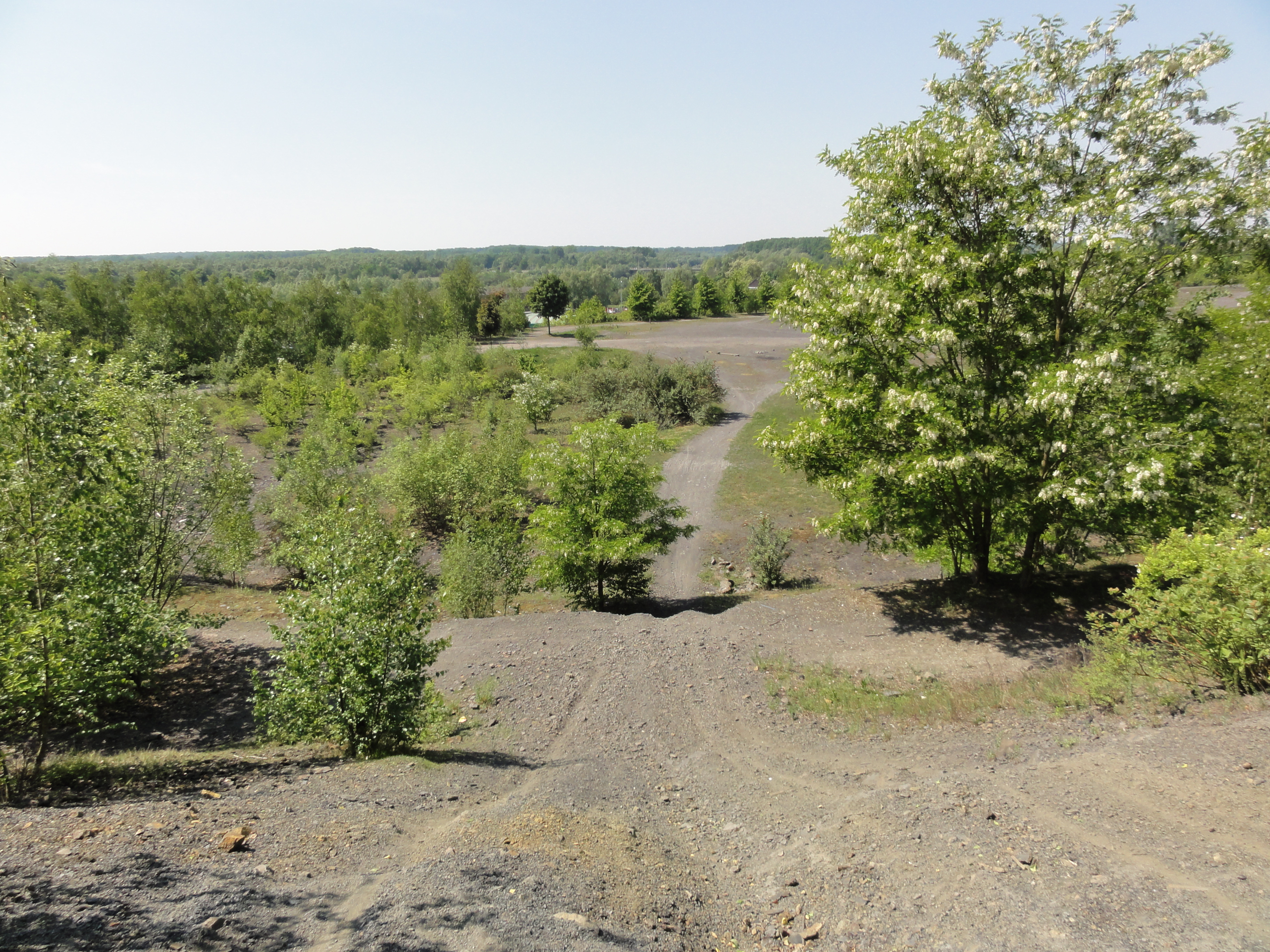 Terril n° 191 dit Vieux-Condé, Fosse Vieux-Condé de la Compagnie des mines d'Anzin, Vieux-Condé, Nord, Nord-Pas-de-Calais, France.